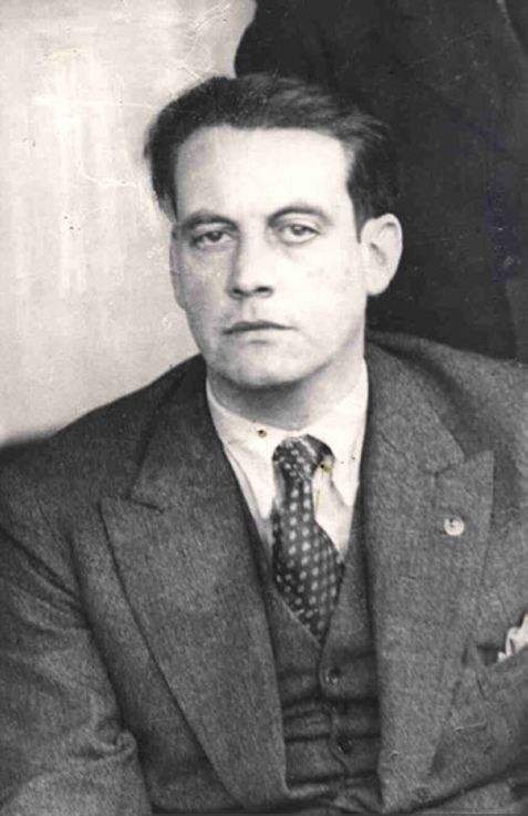 Ricardo A. Latcham, 1940.